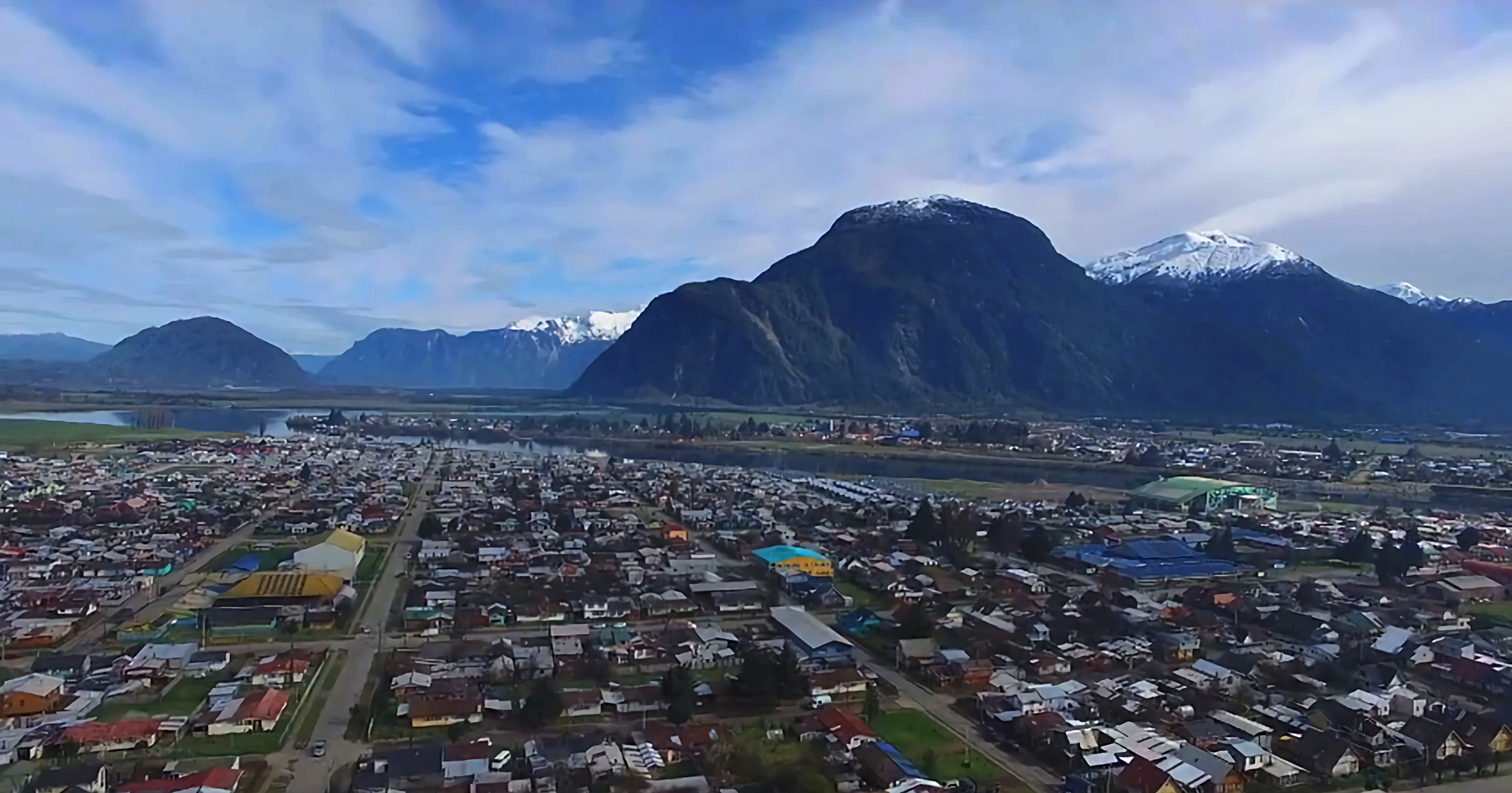 Vista de Puerto Aysén